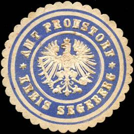 Sealing stamp Title: Amt Pronstorf - Kreis Segeberg Description: blau, weiß, geprägt Place: Segeberg size: 4 cm